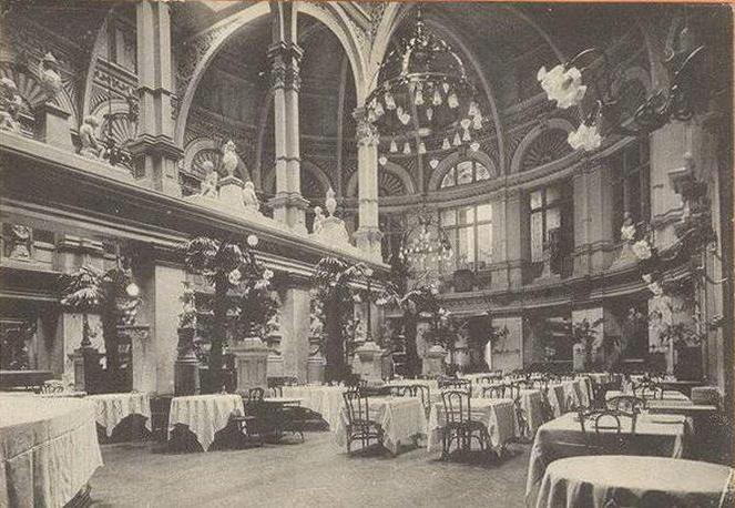 Photographie de l'intérieur du restaurant le Bazar slave. Date non connue. Dernier quart du XIXe siècle